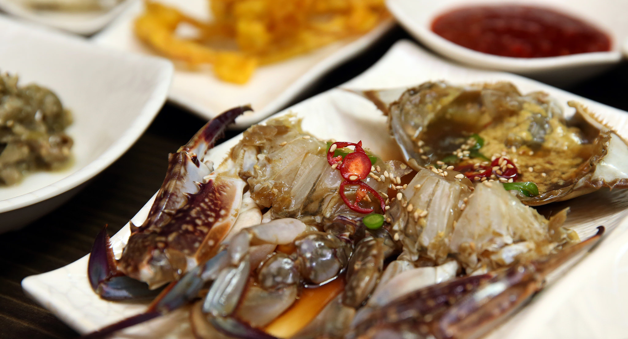 한국의 요리 간장게장